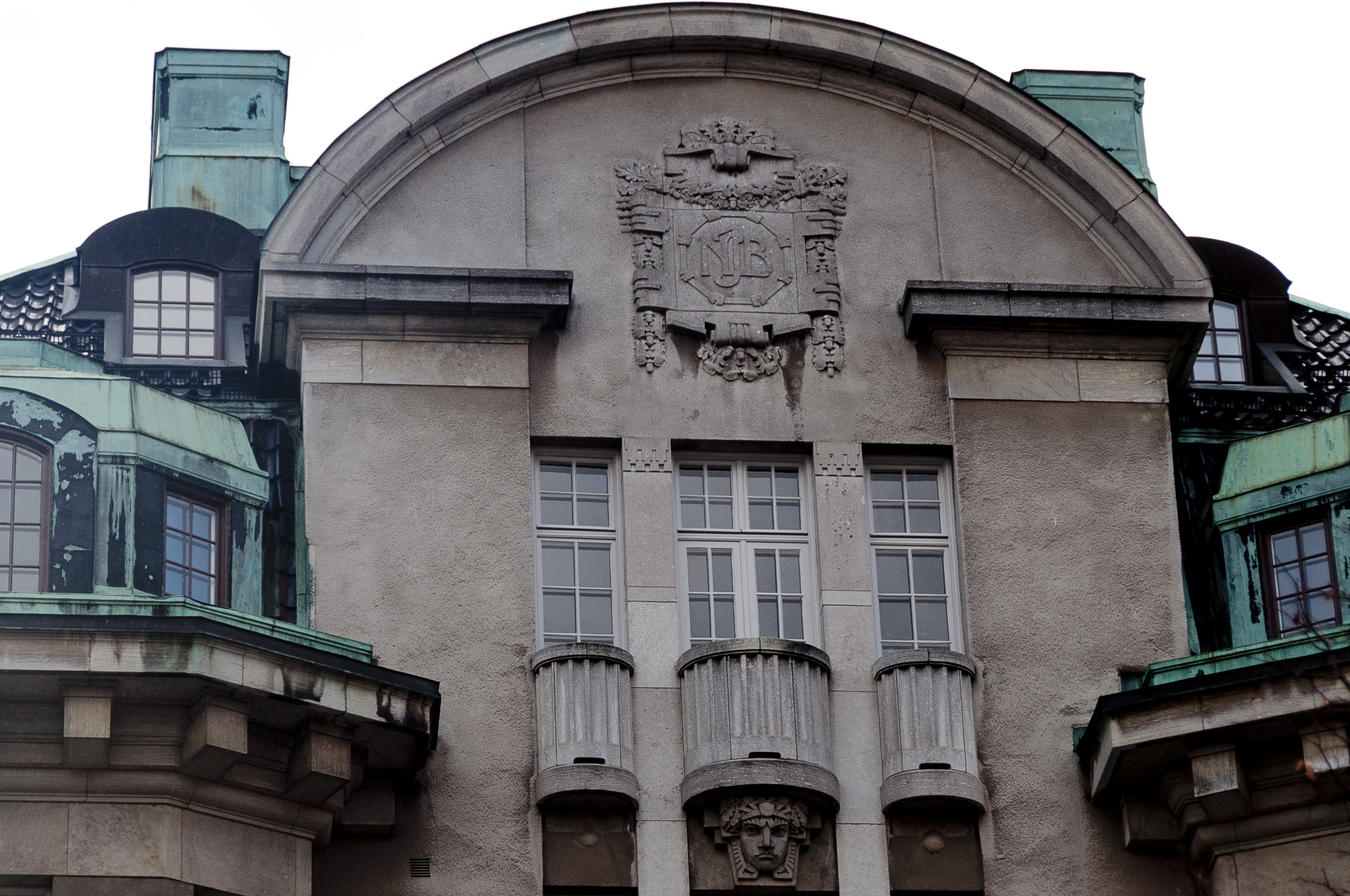 Byggherre N J Bengtsons monogram på Poppeln 2 mot Runebergsplan